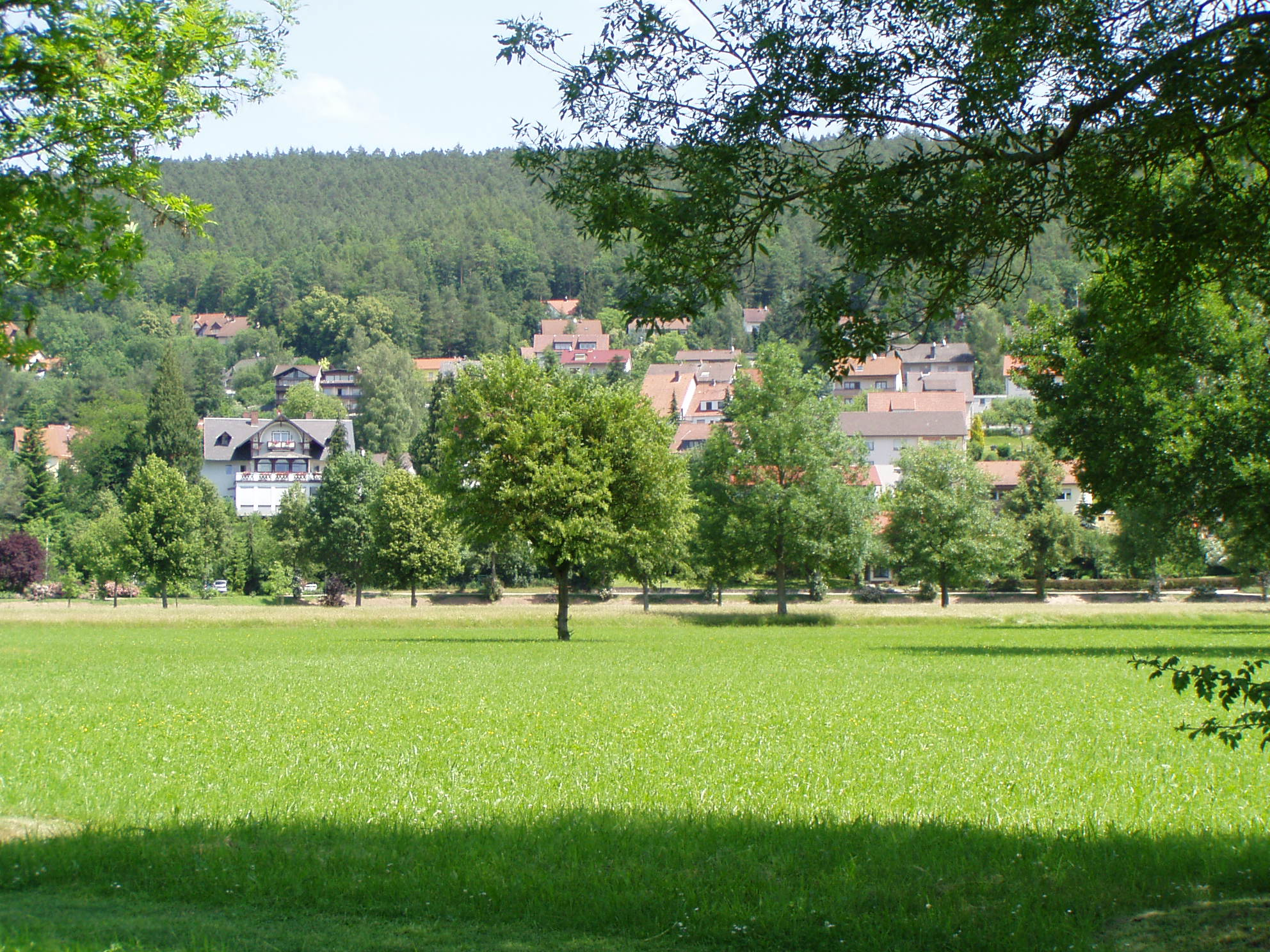 View to Bad Bocklet